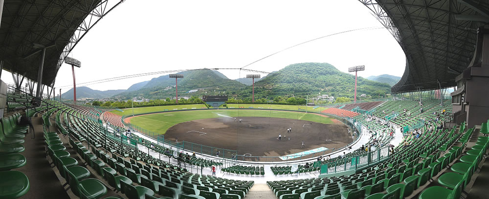 2006年6月11日(香川対徳島)投稿者により撮影されました。 2006年6月22日 (木) 16:17 . . Gomurafuji . . 1000×408 (124,816 バイト)